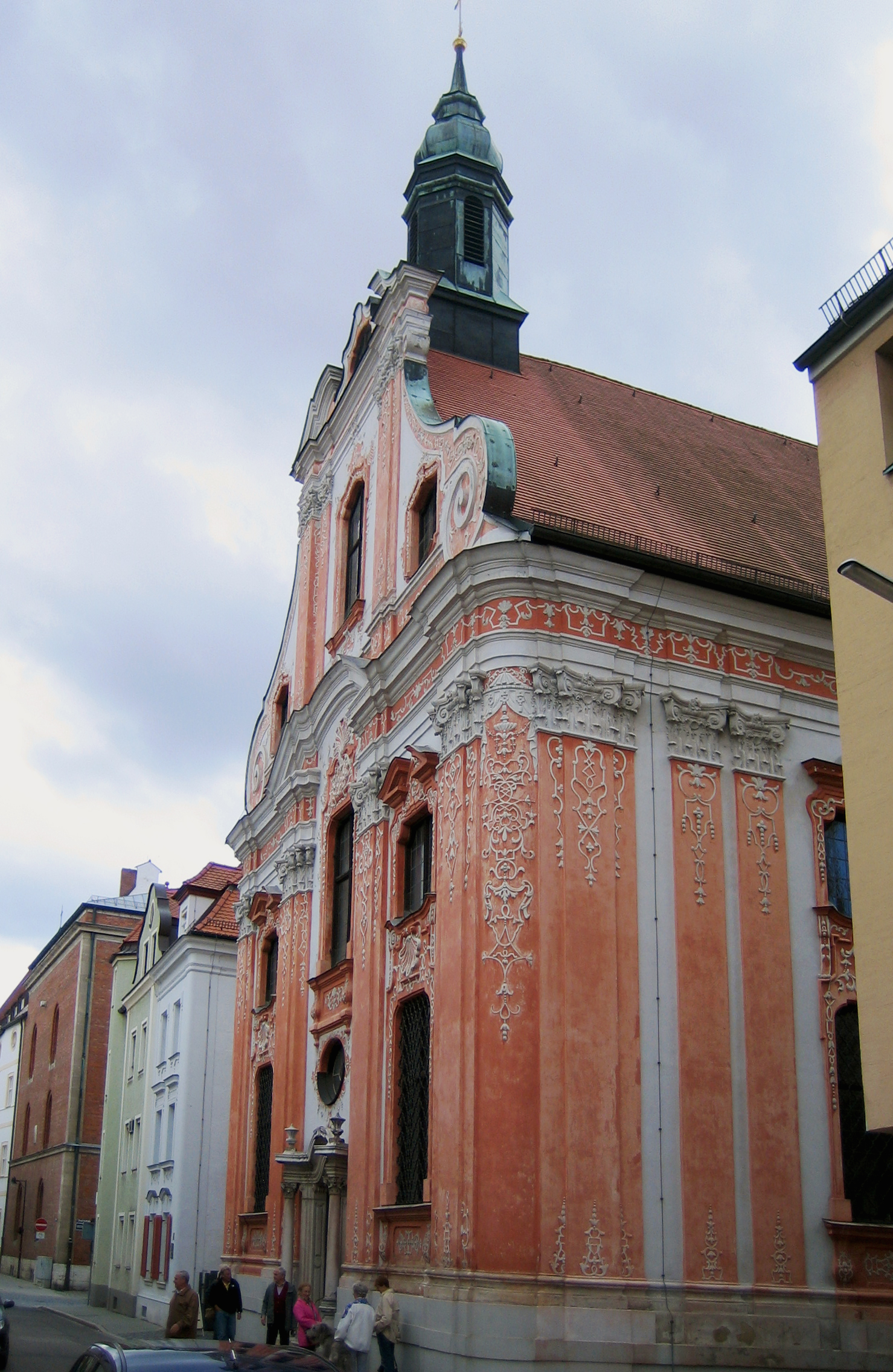 Außenansicht der Asamkirche in Ingolstadt.